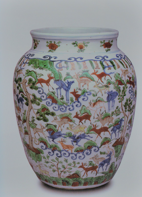 中文（台灣）: 明代萬曆五彩百鹿尊